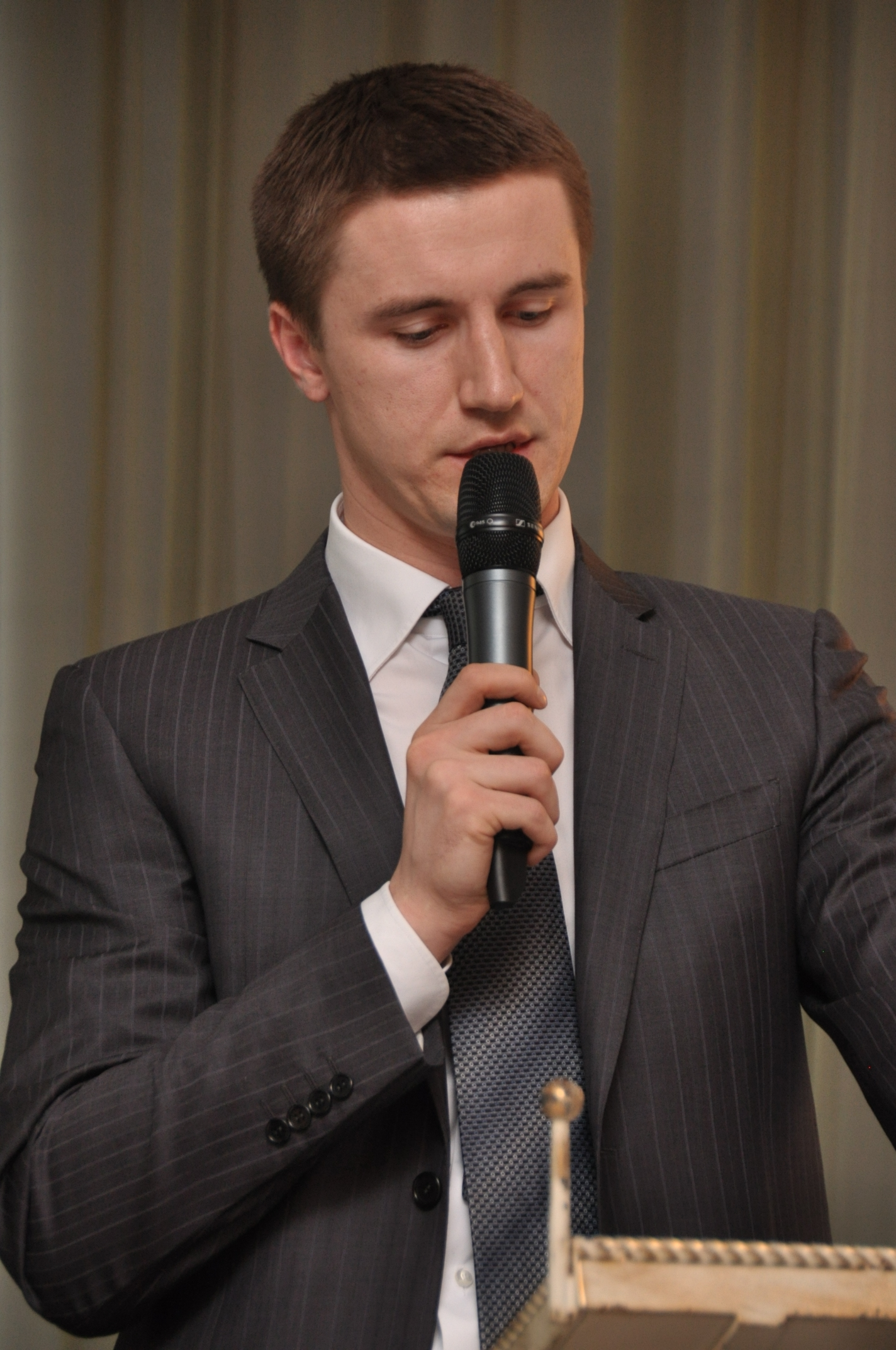 Представитель Внешэкономбанка